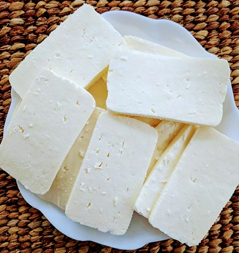 Queso turrialba costarricense: fresco, blanco y suave.